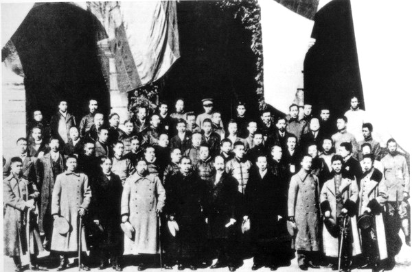 南京临时参议院总统府同仁摄影，民国元年二月